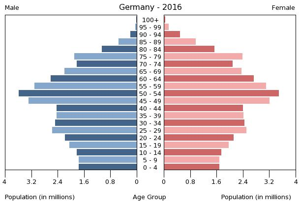 Deu